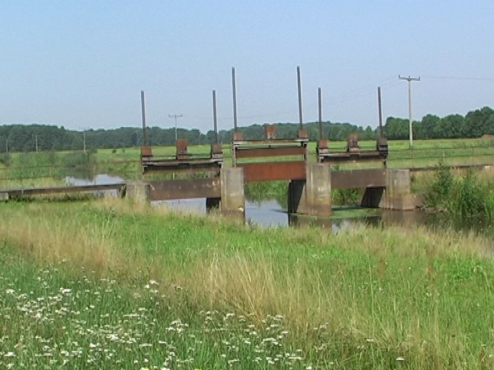 spušćadło wokoło Noweje Niwy